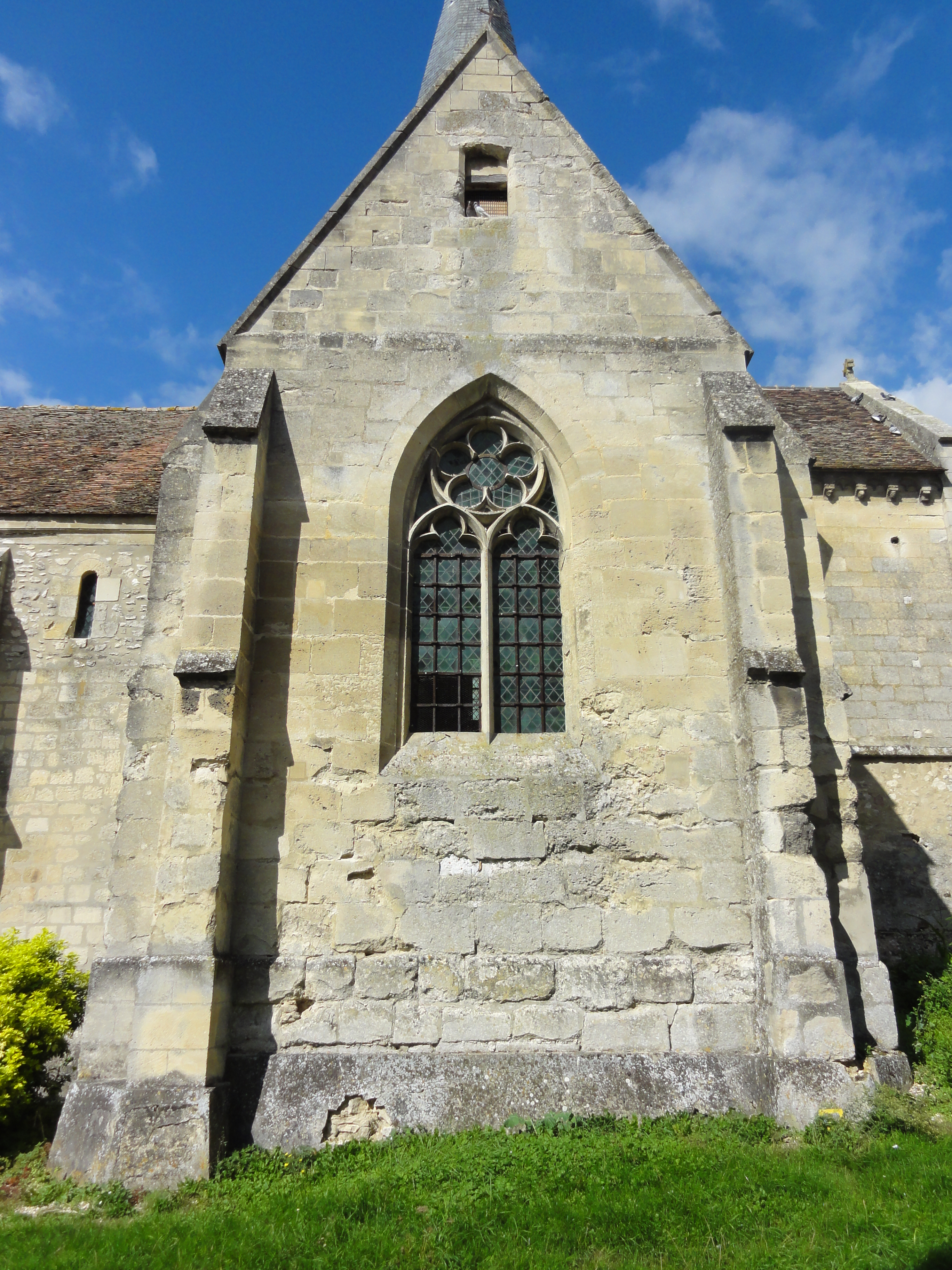 Église Saint-Pierre-aux-Liens-et-Saint-Étienne de Brignancourt - voir titre.